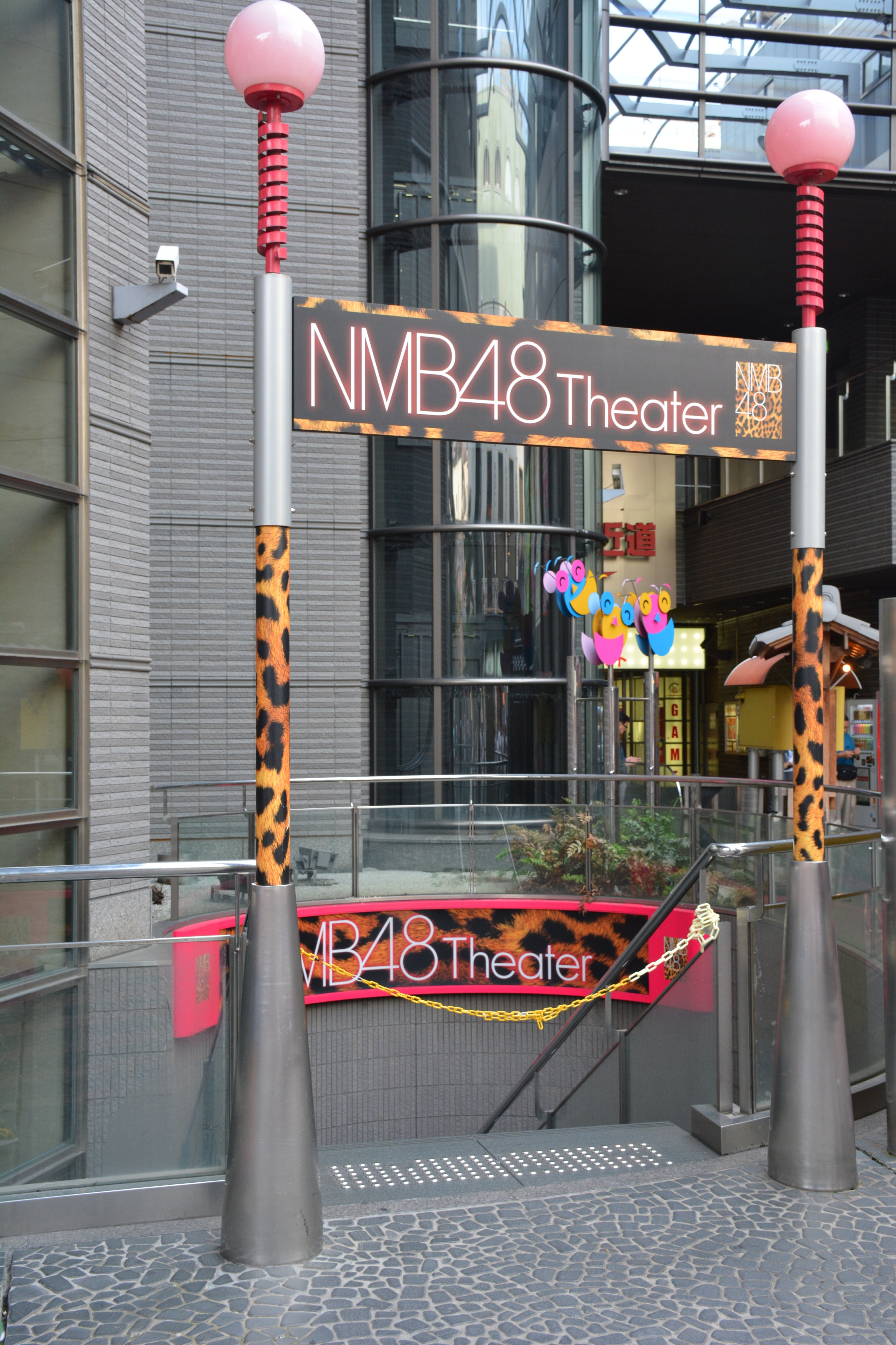 中文（台灣）: 日本大阪府大阪市中央區難波千日前，NMB48劇場入口。